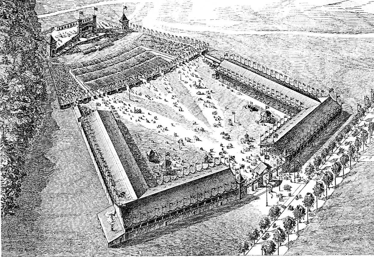 Le Festspiel de Berne de 1891 sur la place des fêtes au Dählhölzli. Schweizerischer Theaterkultur-Verlag, Willisau.